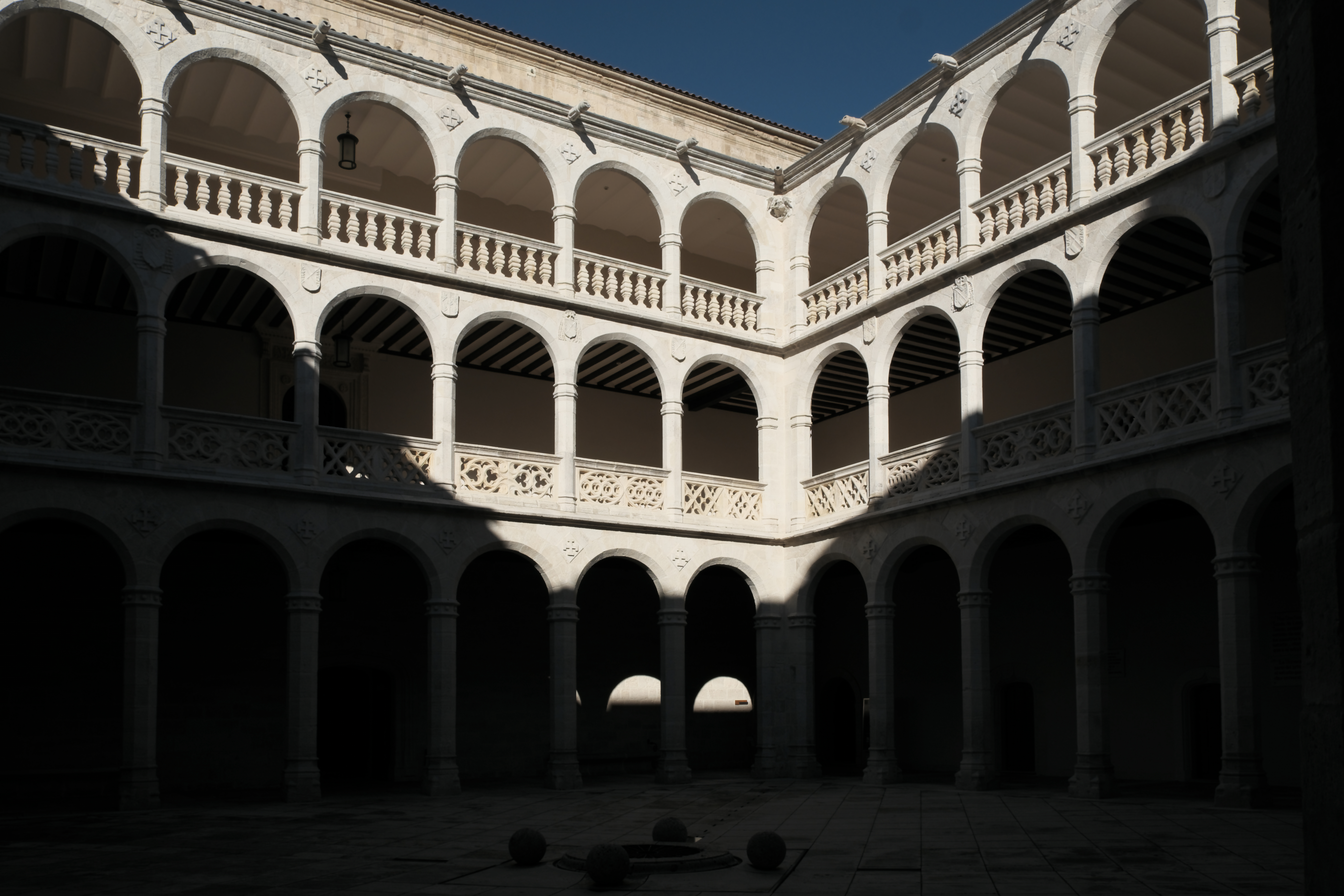 Palacio de Santa Cruz in Valladolid (Kastilien und León/Spanien), Innenhof